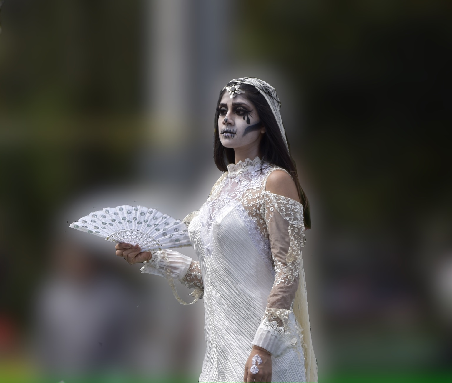 ES ESTA TRADICIÓN NUESTROS FAMILIARES MUERTOS NOS VISITAN PERO NO SOLO ELLOS TAMBIÉN LAS LEYENDAS Y ALMAS EN PENA, EN ESTA FOTO EN EFECTO BOCHEN BUSQUE EL LADO ANGELICAL QUE ATRAE A QUIEN SE ACERQUE A ELLA TAL VEZ A UNA MUERTE SEGURA